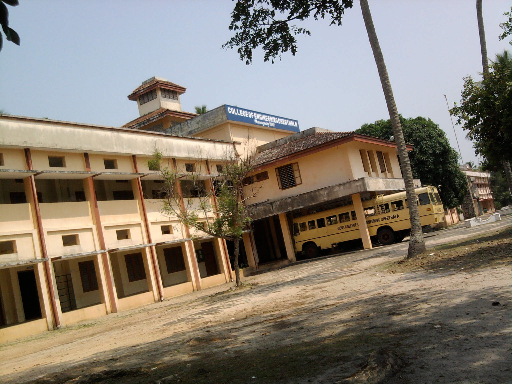 കോളേജ് ഓഫ് എഞ്ചിനീയറിംഗ്, ചേർത്തല